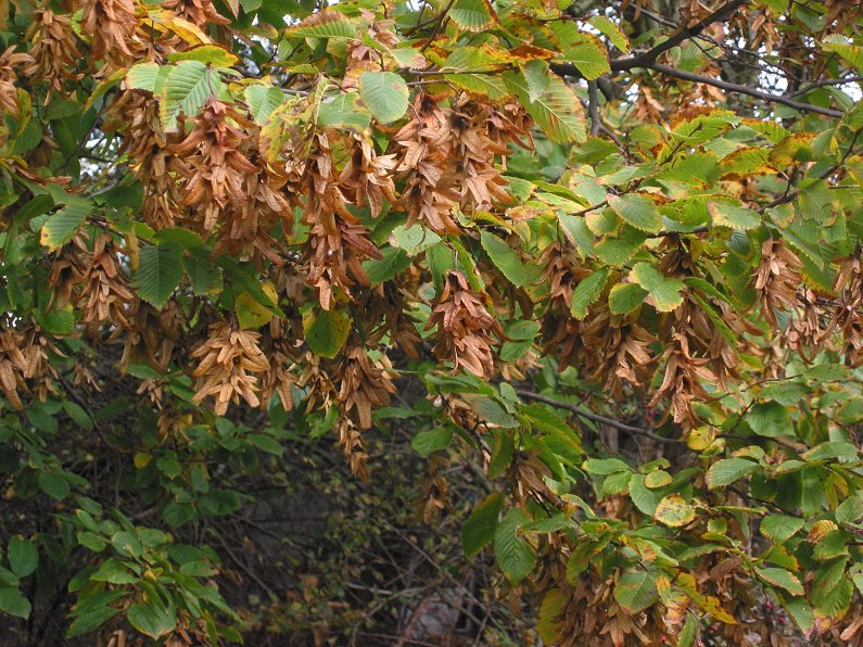 (Haagbeuk) Carpinus betulus